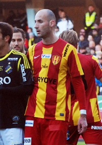 Dinko Felić